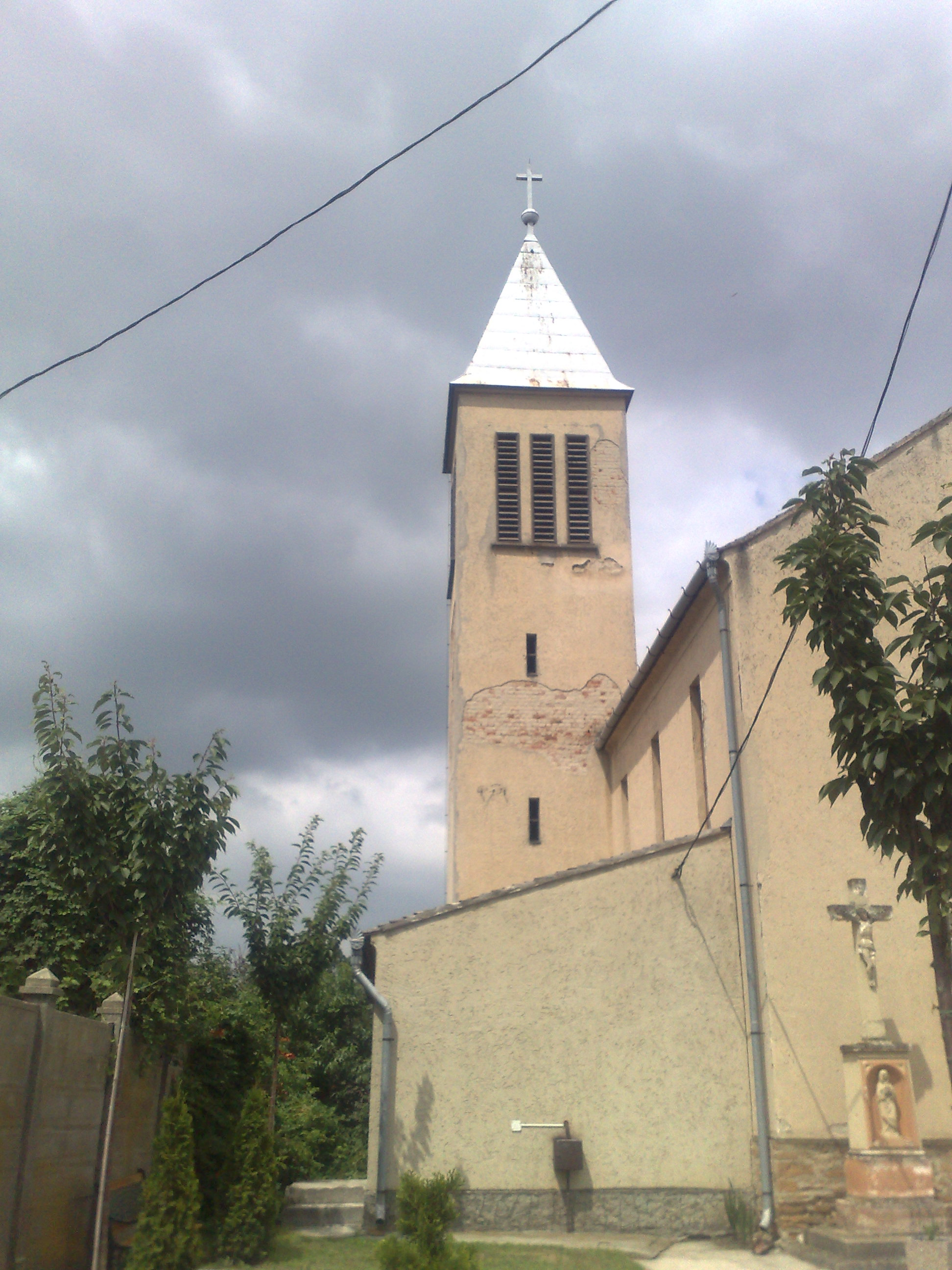 Katolikus templom Sobor községben